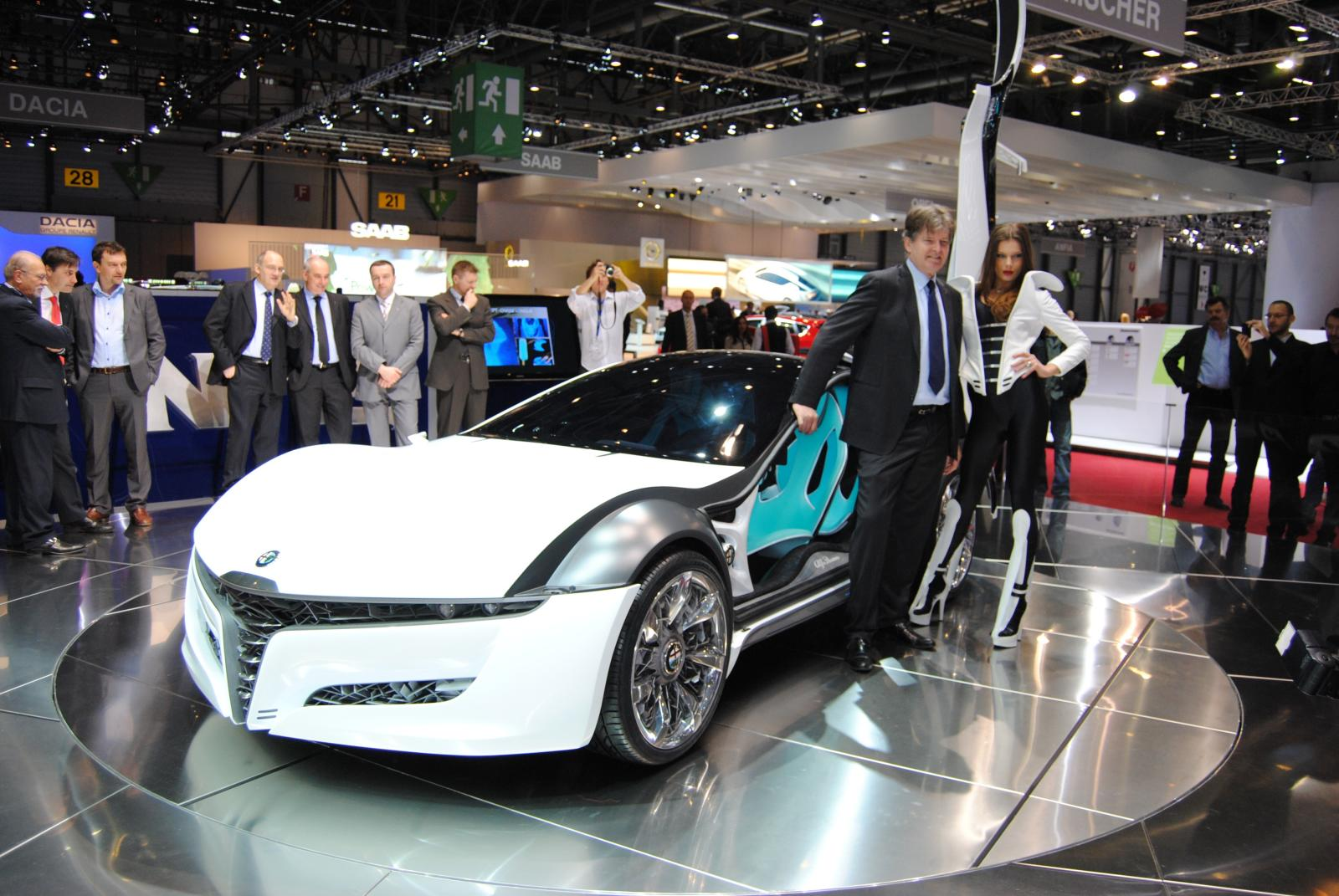 Geneva2010 527